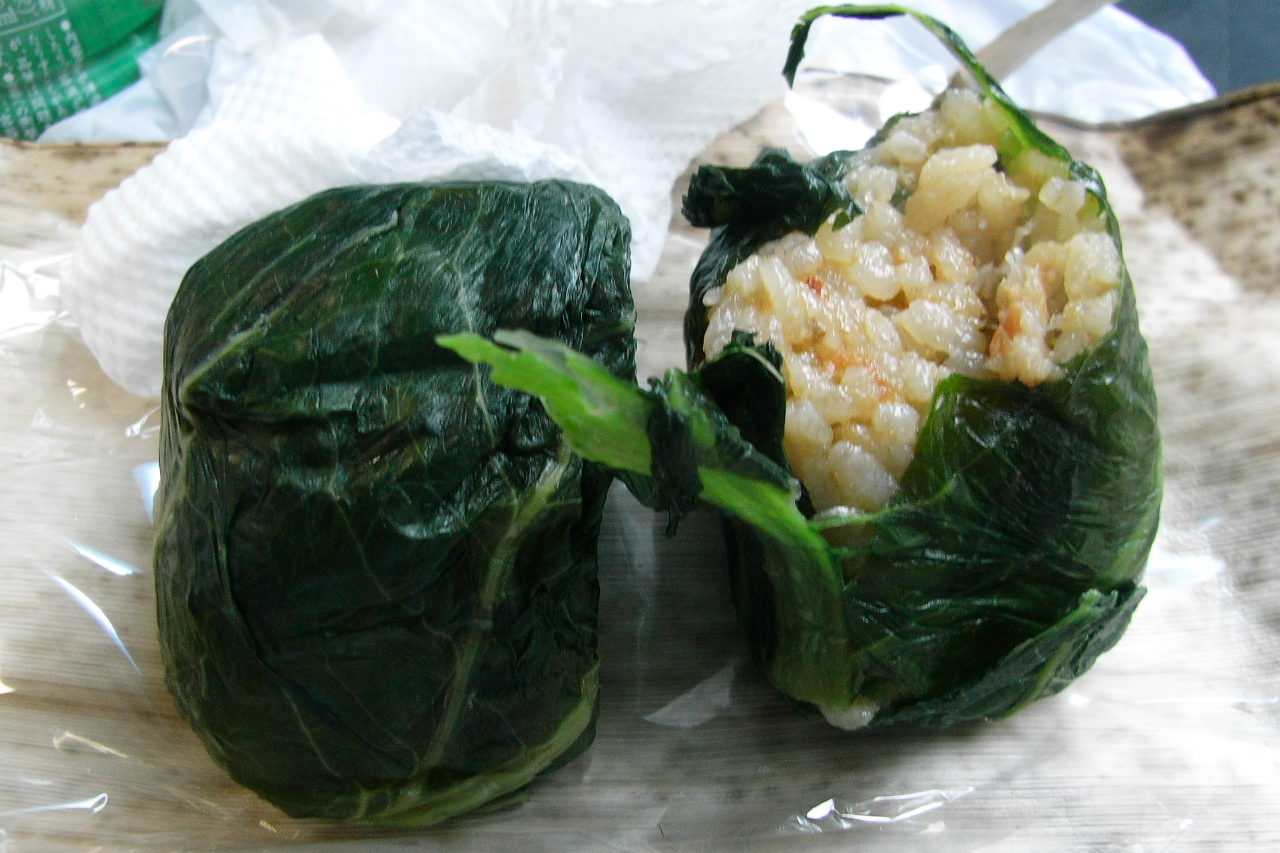 和歌山名物らしい。大阪伊丹空港の売店で購入して、新大阪までのバスの中で食べた。